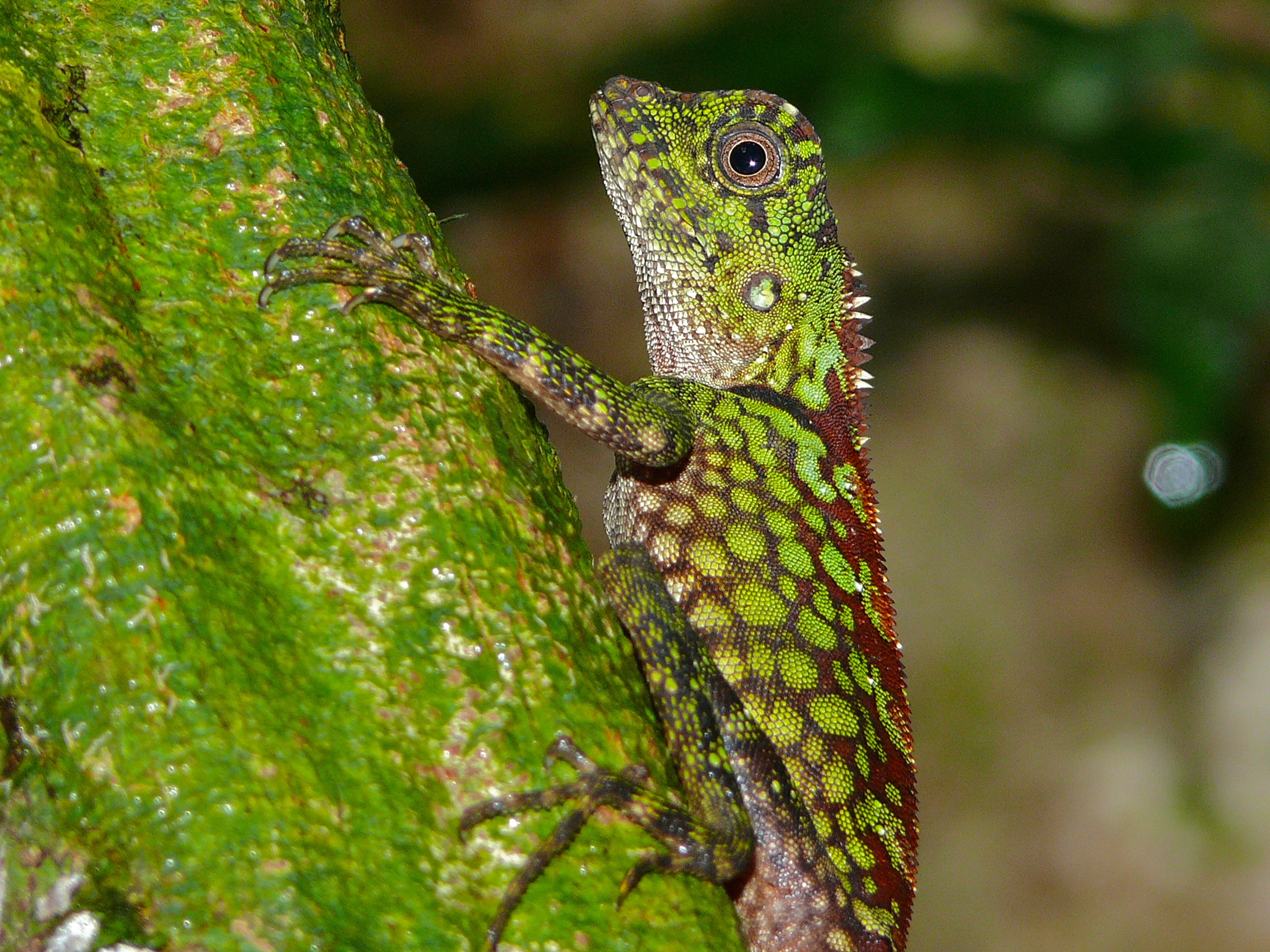 Gunung Mulu NP, Sarawak, MALAYSIA